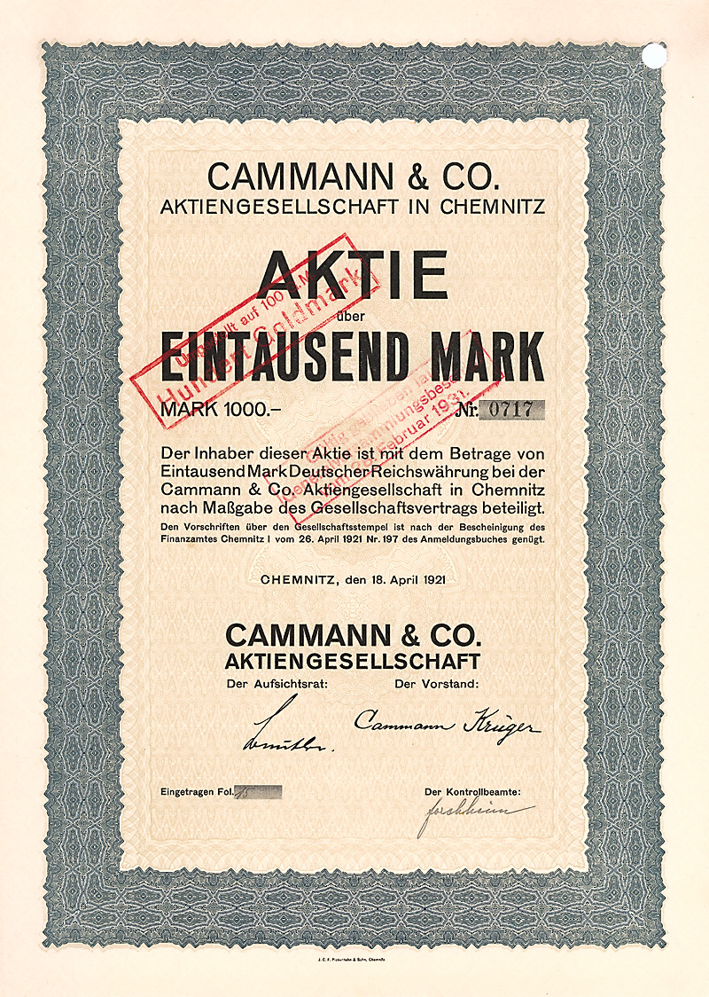 Aktie über 1000 Mark der Cammann & Co AG vom 18. April 1921